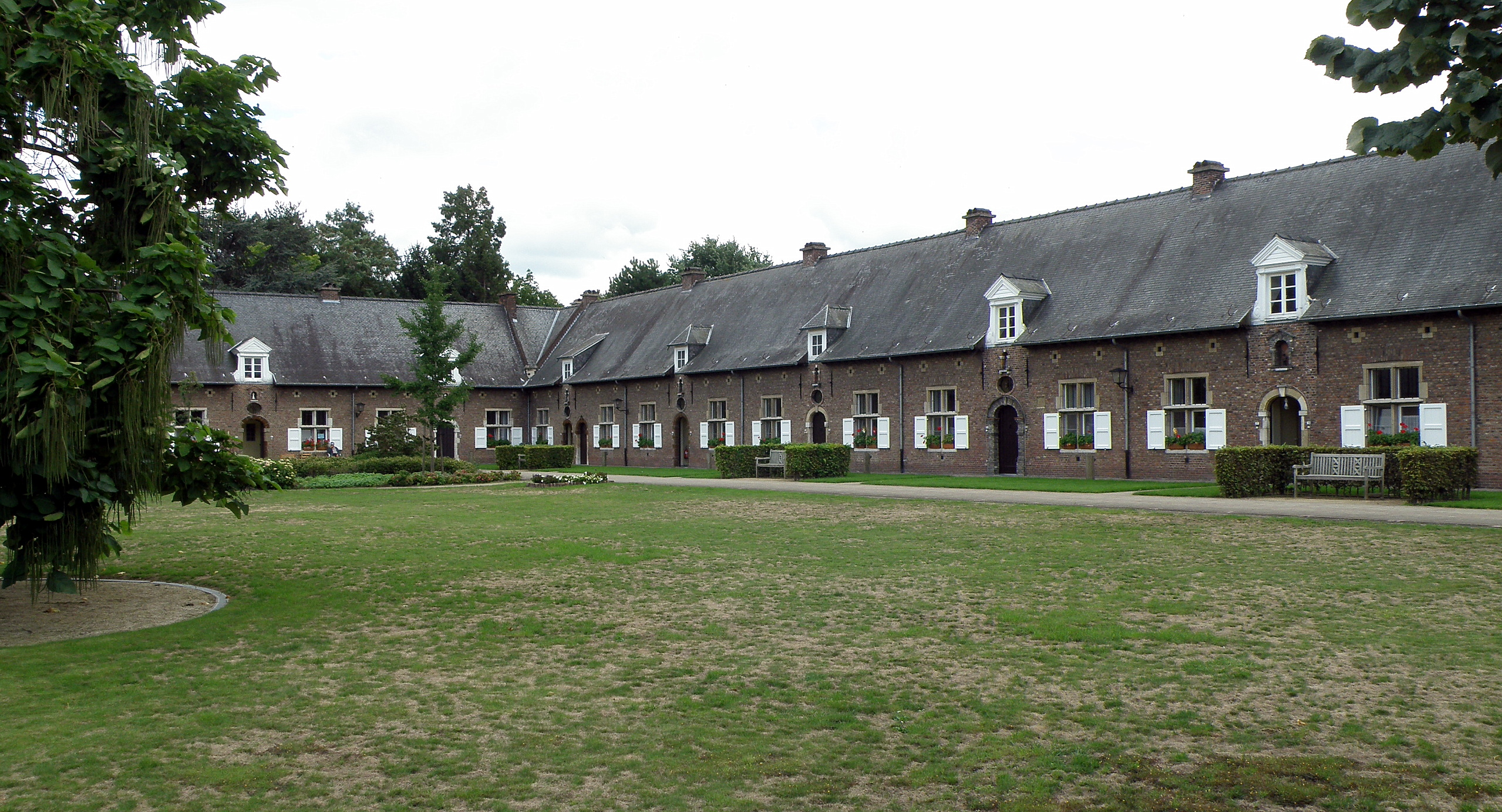 Aarschot, ville de Flandre (prov. de Brabant-Flamand, Belgique). Béguinage. Maisonnettes de béguines, originellement du XVIIe siècle, reconstruites à l'identique après leur destruction pendant la deuxième guerre mondiale, formant la face est (à gauche sur la photo) et sud (à droite) du quadrilatère que constituait autrefois le dries (=pleine arborée centrale) du béguinage.